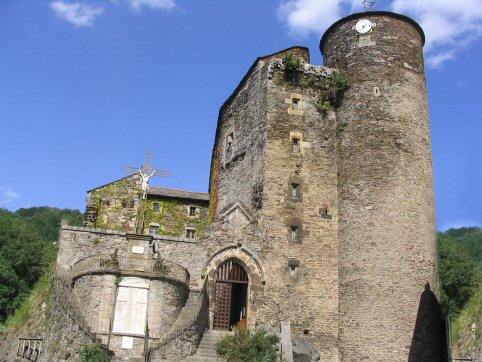 Chateau de Coupiac datant du XVème Siecle Auteur: Emilie CONDOMINES